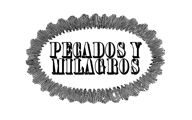 Logo con tipografía del álbum "Pecados y Milagros" de Lila Downs